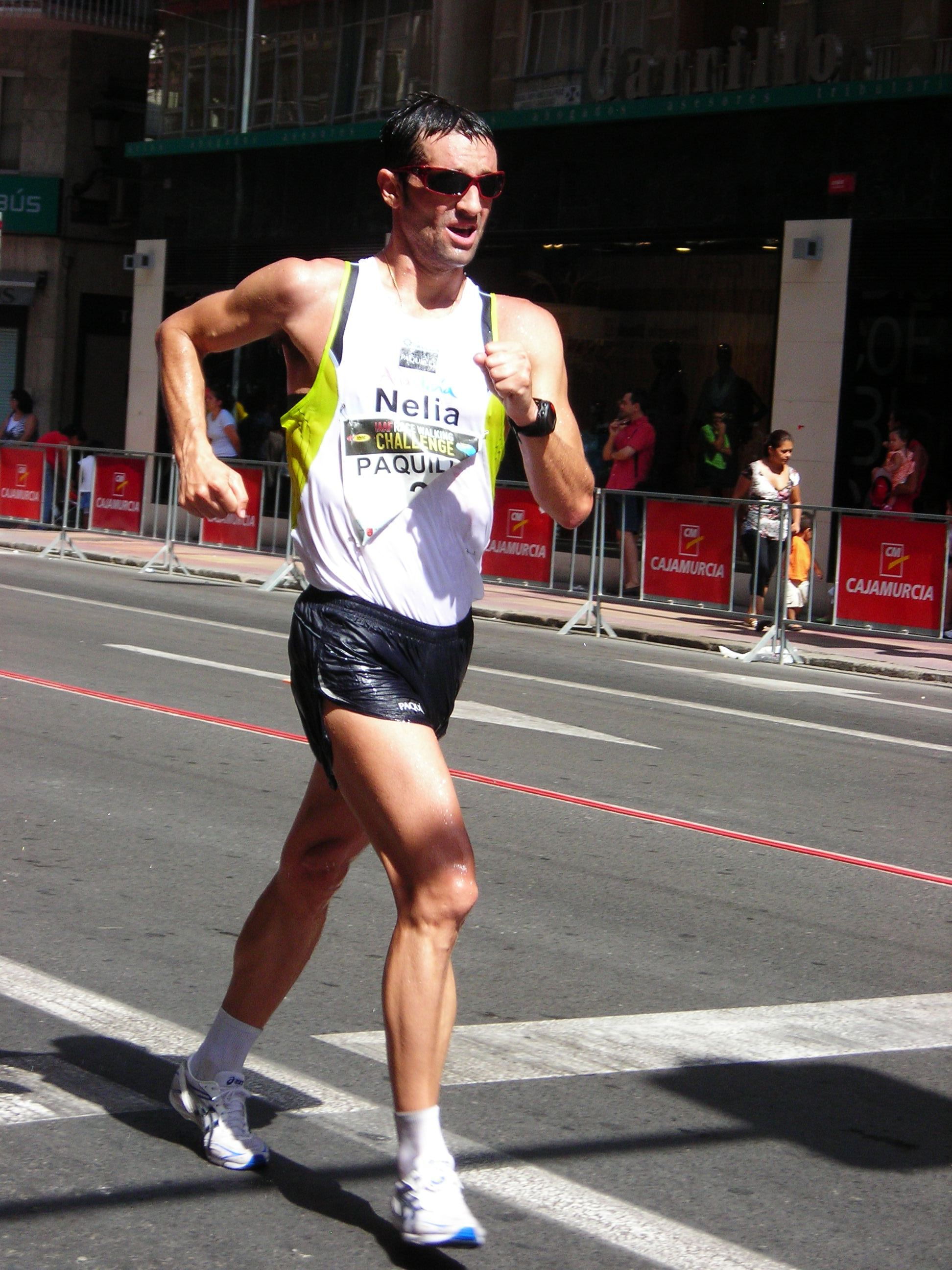 El atleta español Paquillo Fernández durante la final de la Challenge Mundial celebrada en Murcia en 2008.